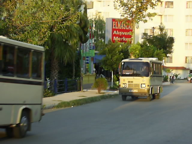 Dolmus buses in Antalya. 2005. By Timea Baksa.